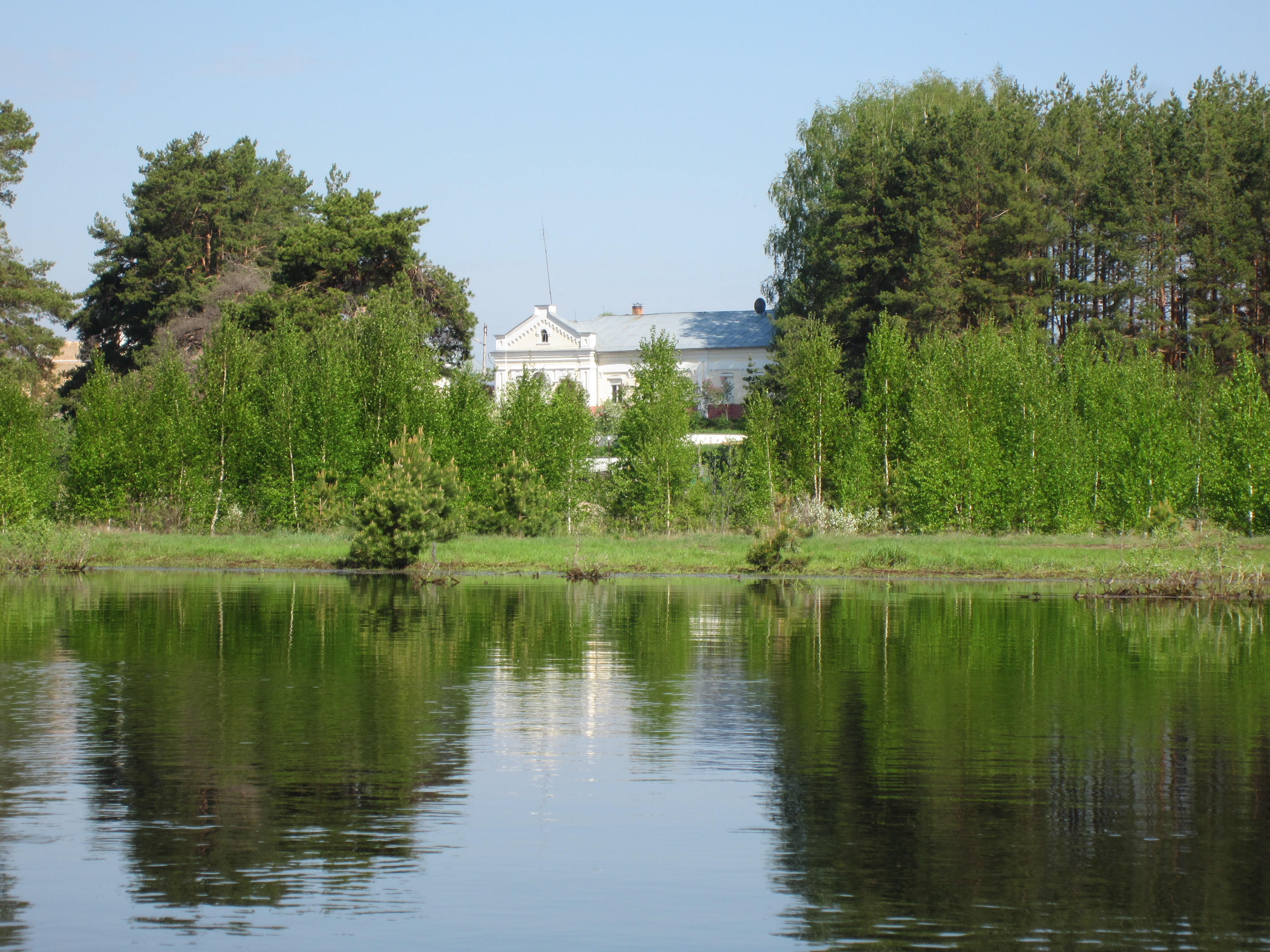 Усадьба в деревне Калдеево, вид с воды.